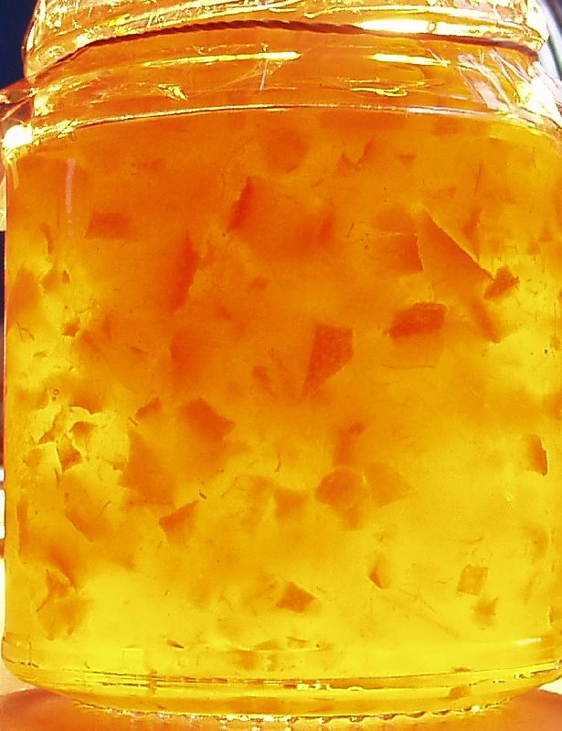 Today I made marmalade......mmm!